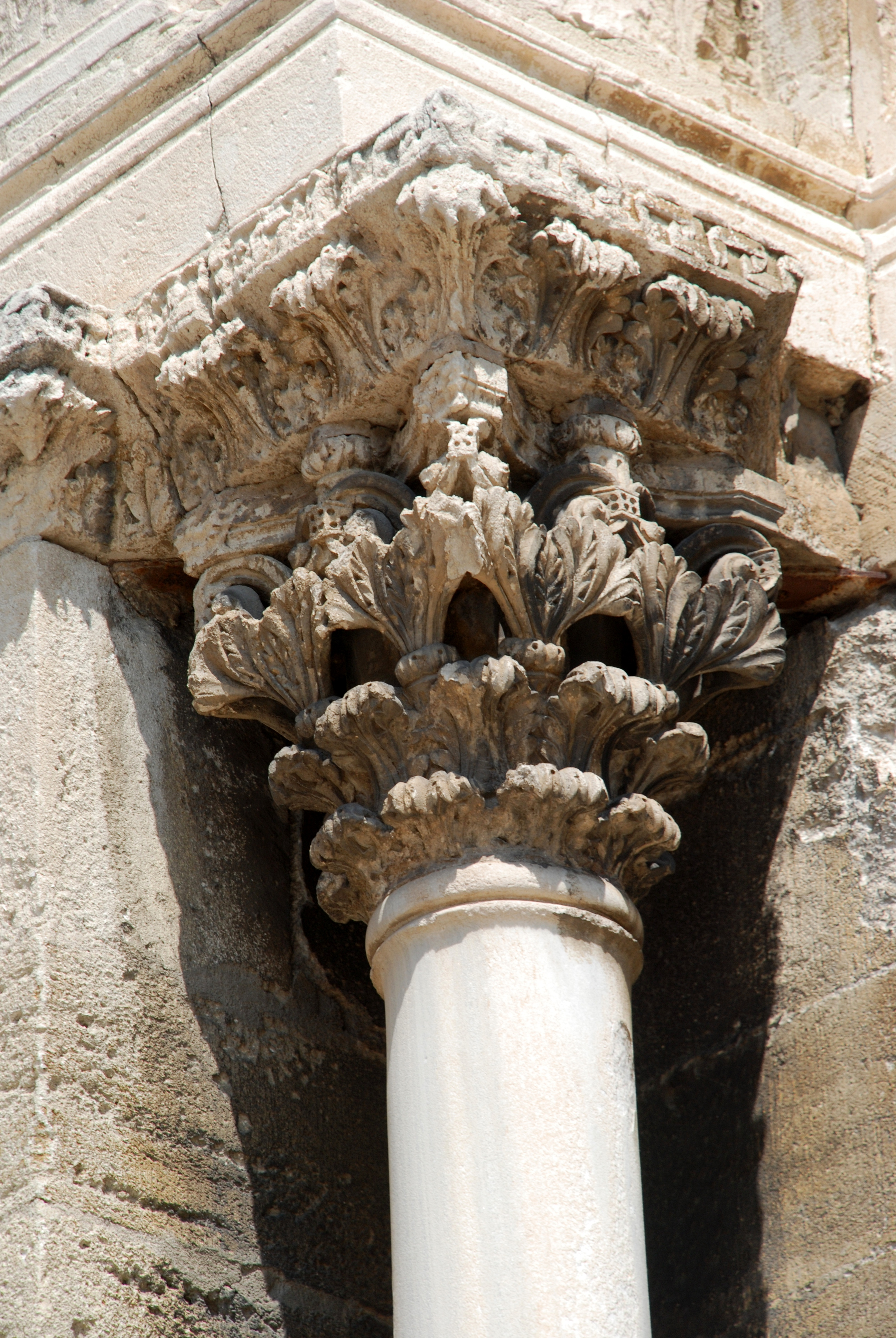 France - Provence - Tarascon - Église Sainte-Marthe de Tarascon